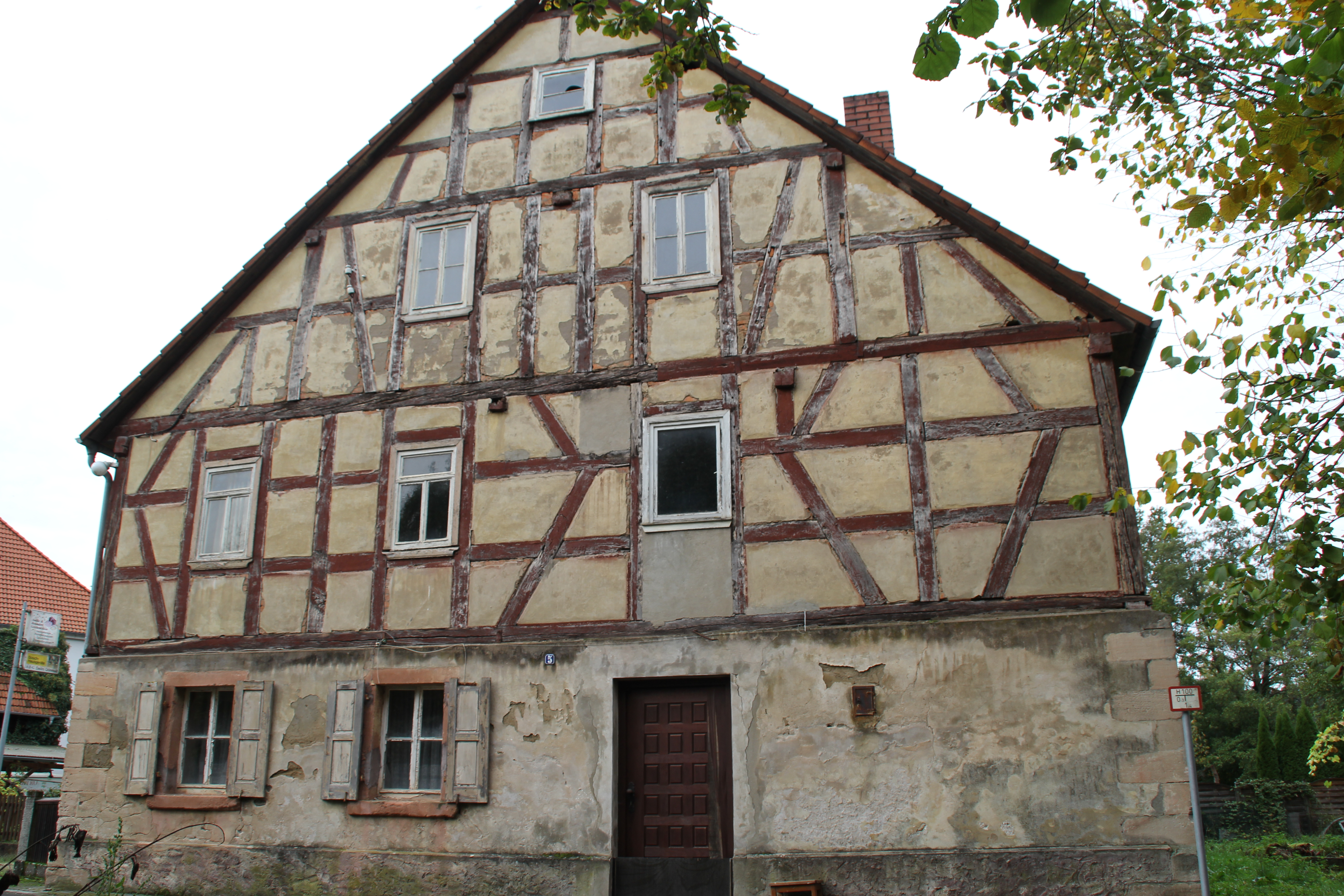 Das Gebäude der ehem. Obermühle in Mömbris im Jahr 2019